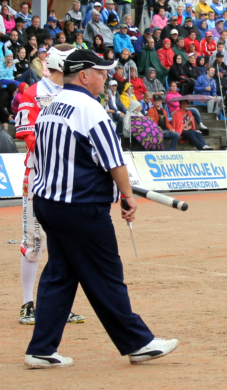 Pesäpallon syöttötuomari Ari Kiviniemi elokuussa 2013